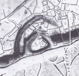 Пінск. План 1794 г. (РДВГА)